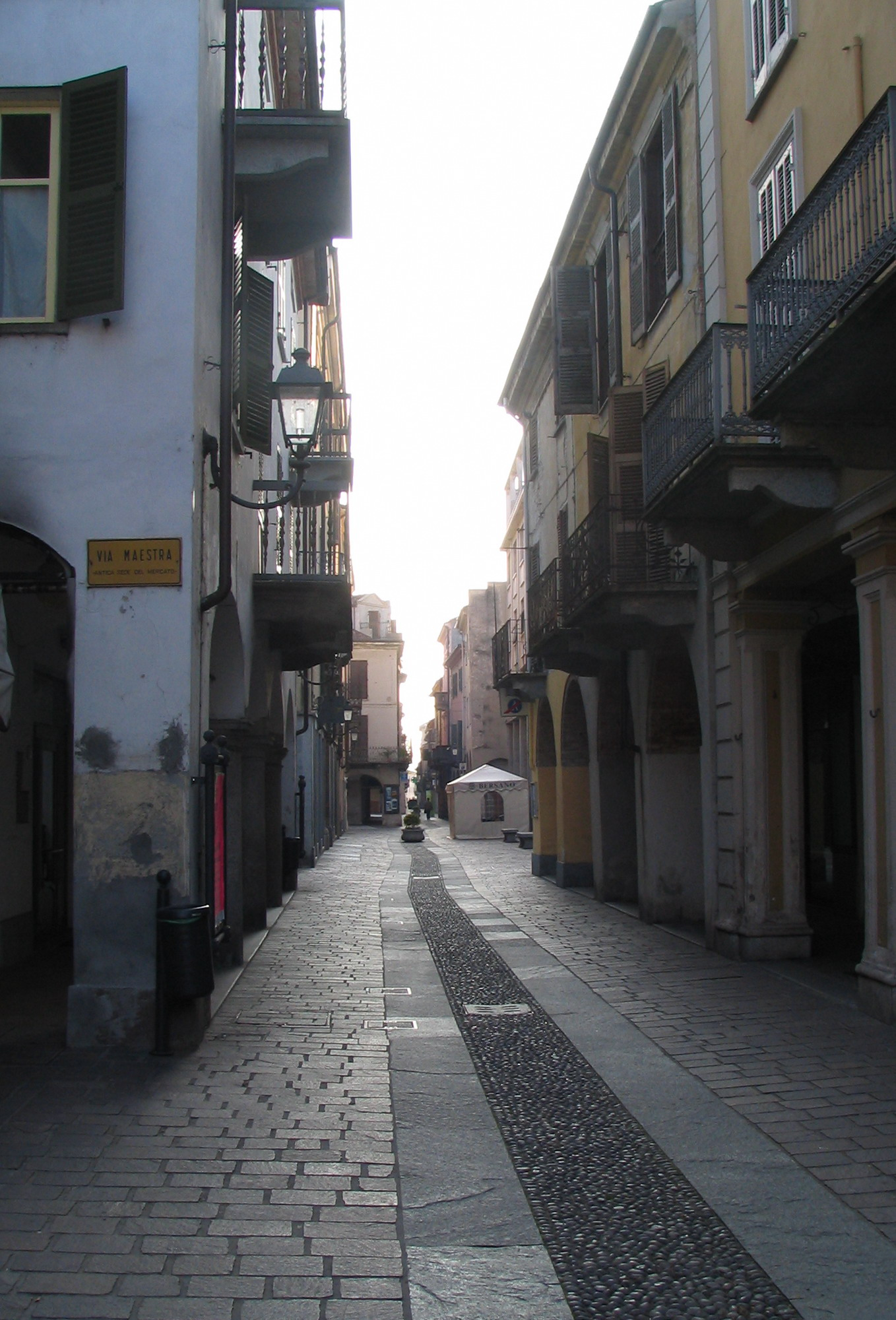 Nizza (Asti),Via Maestra (principal street)